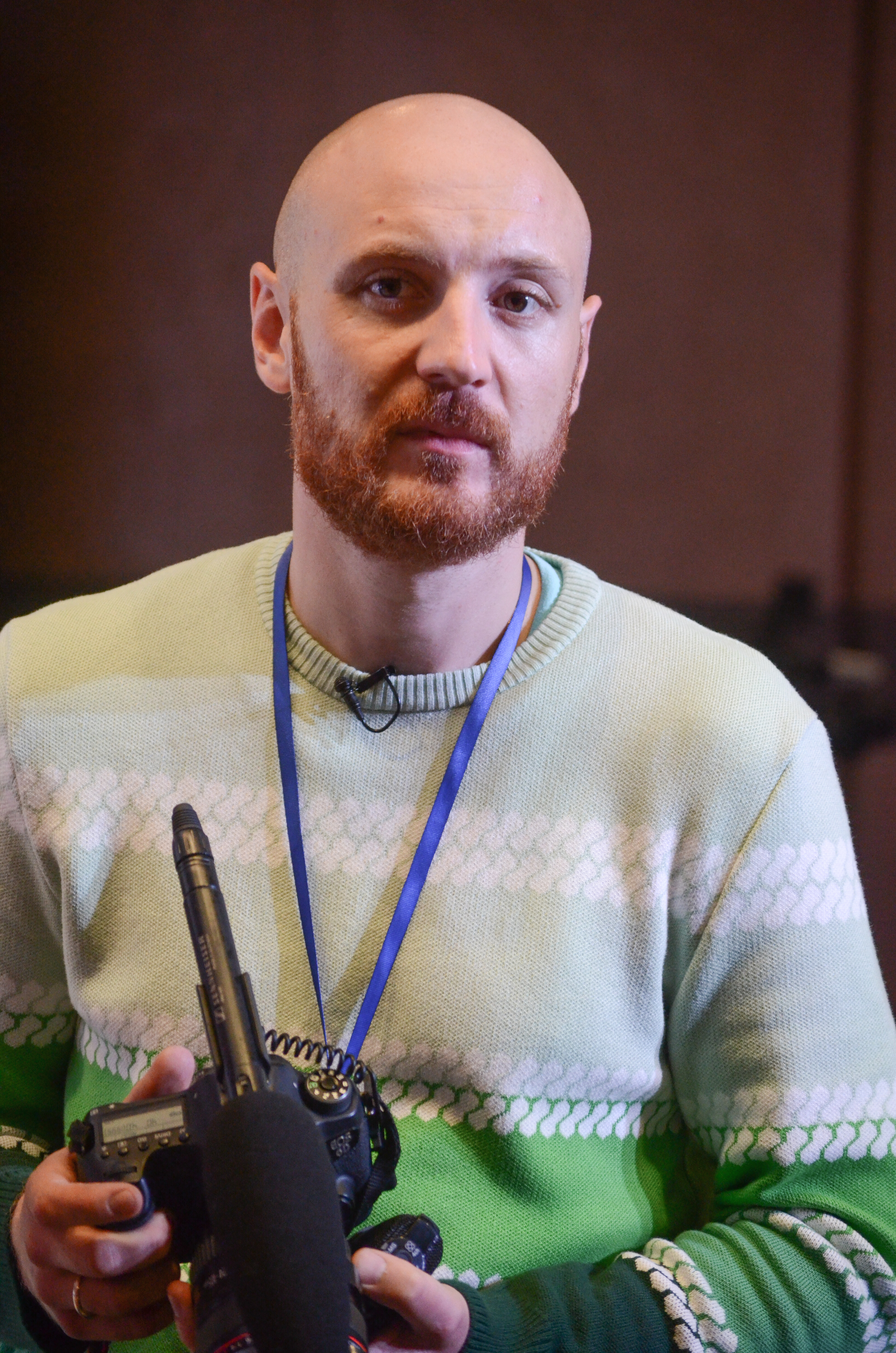 Зустріч Президента України з олімпійцями та паралімпійцями — учасниками Ріо-2016.